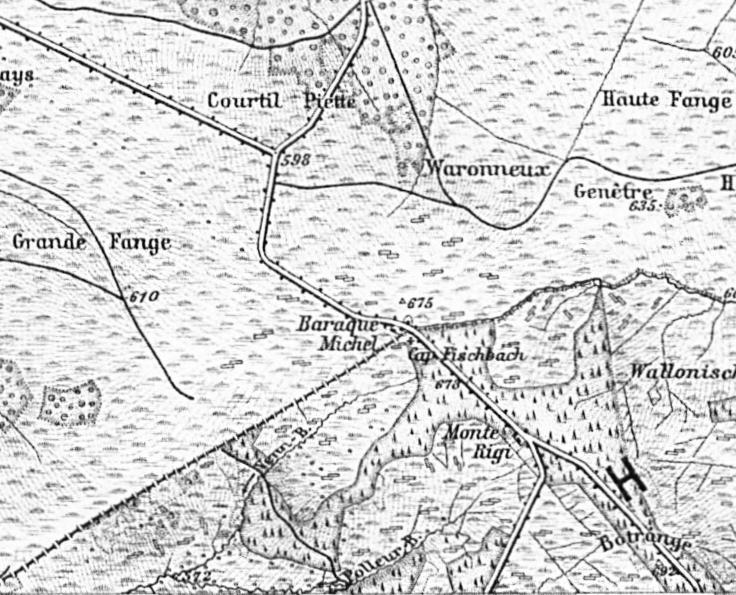 Kaartfragment van de Duitse militaire topografische kaart blad Eupen